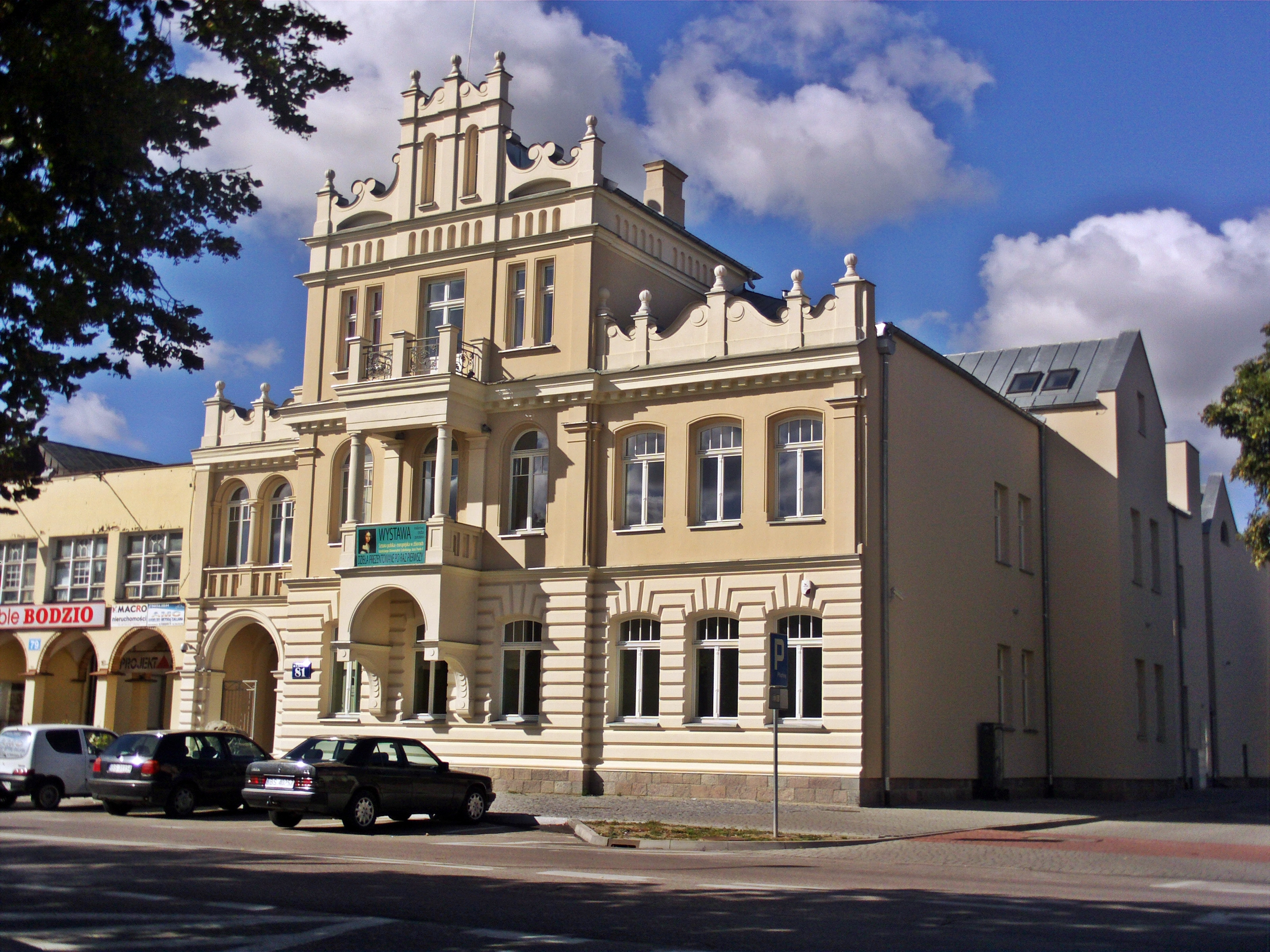 Suwałki - Resursa Obywatelska (zabytek nr A-913 z 15.07.1992)